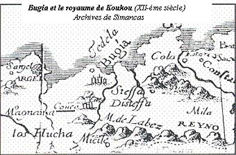 Carte.